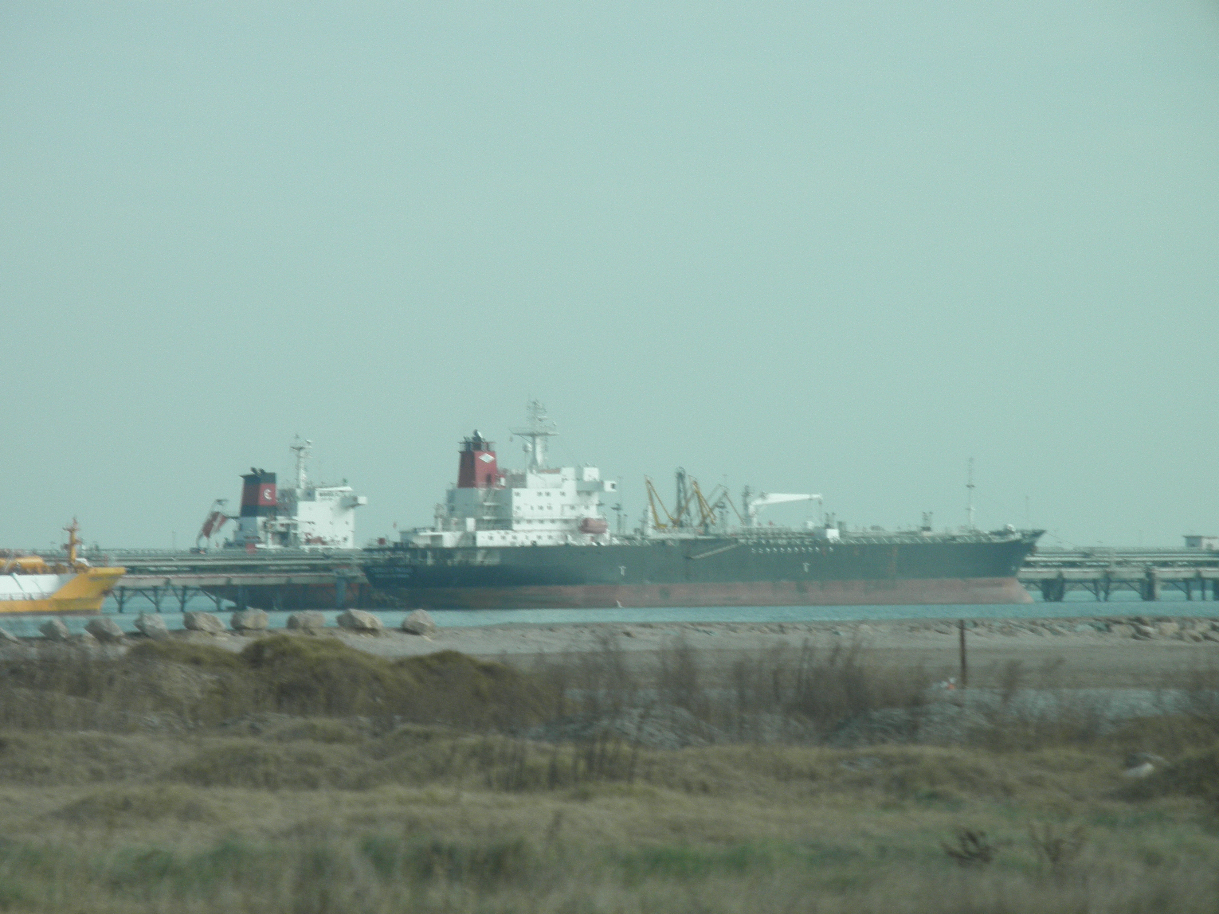 Pantalà per carregar/descarregar cru i derivats.